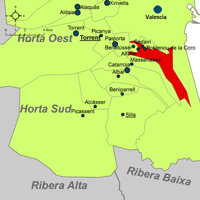 Localización de Alfafar en la comarca de la Huerta de Valencia.